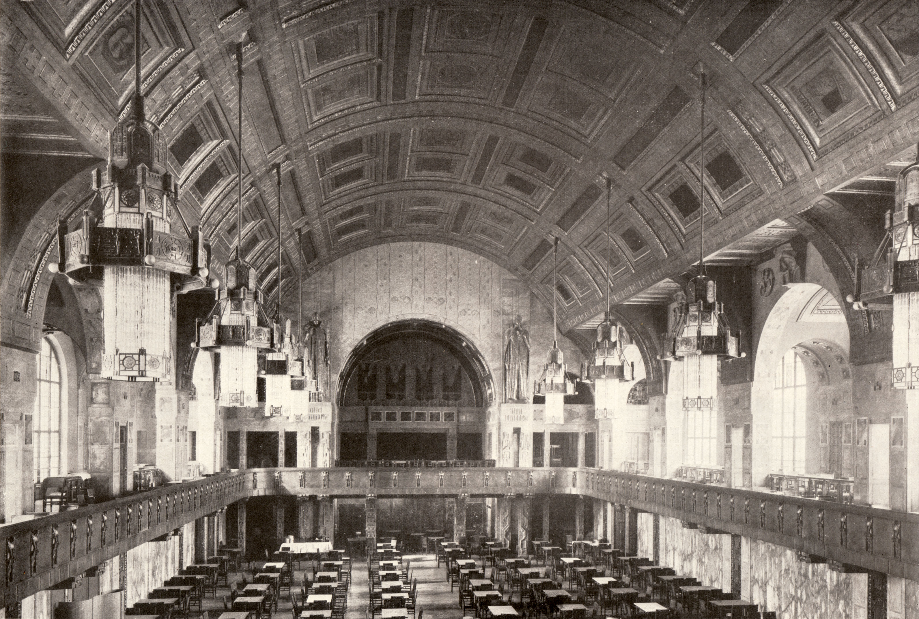 Berlin - Weinhaus Rheingold, Ansicht des Kaisersaales